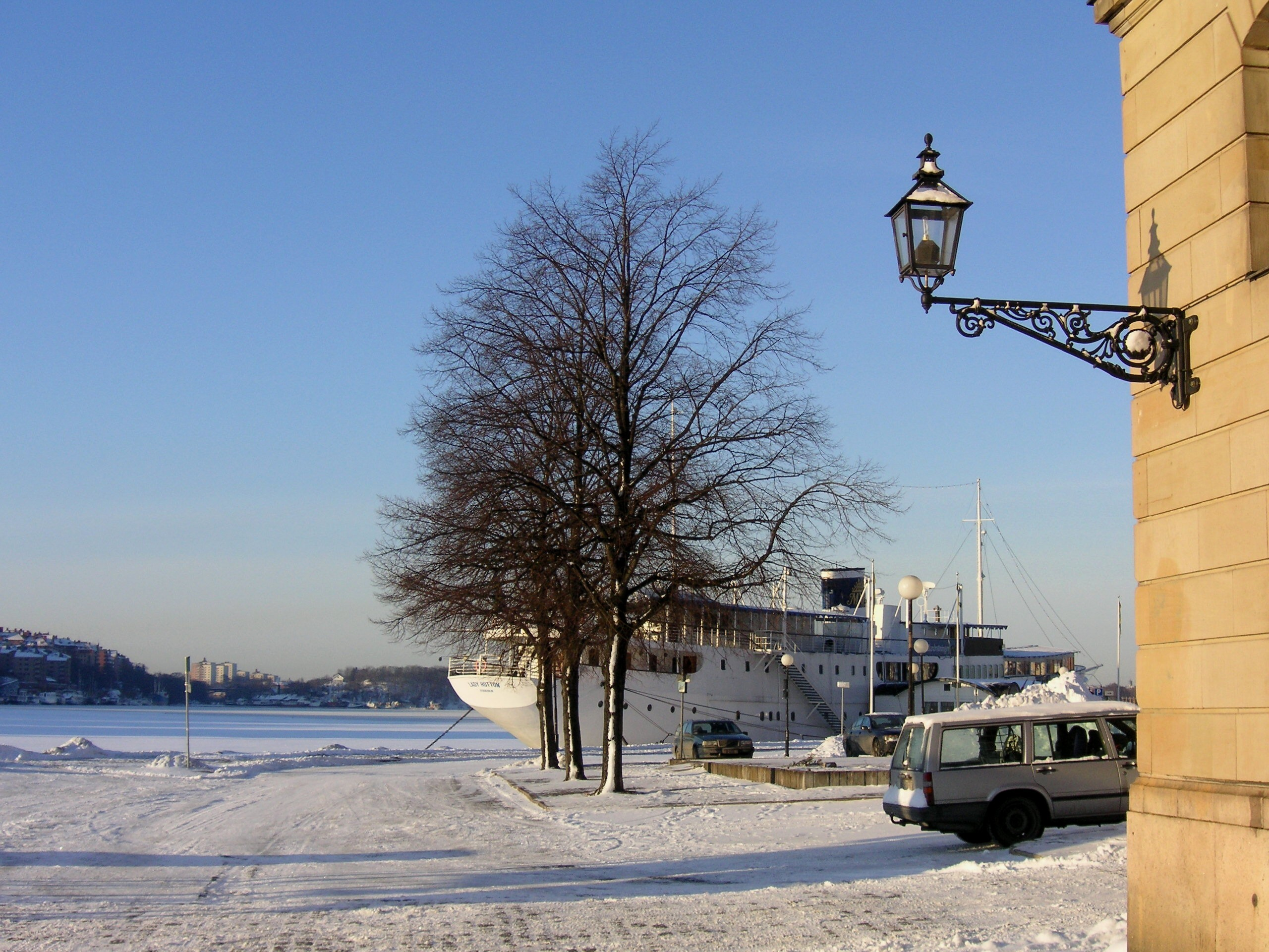 Södra Riddarholmskajen på Riddarholmen, Stockholm